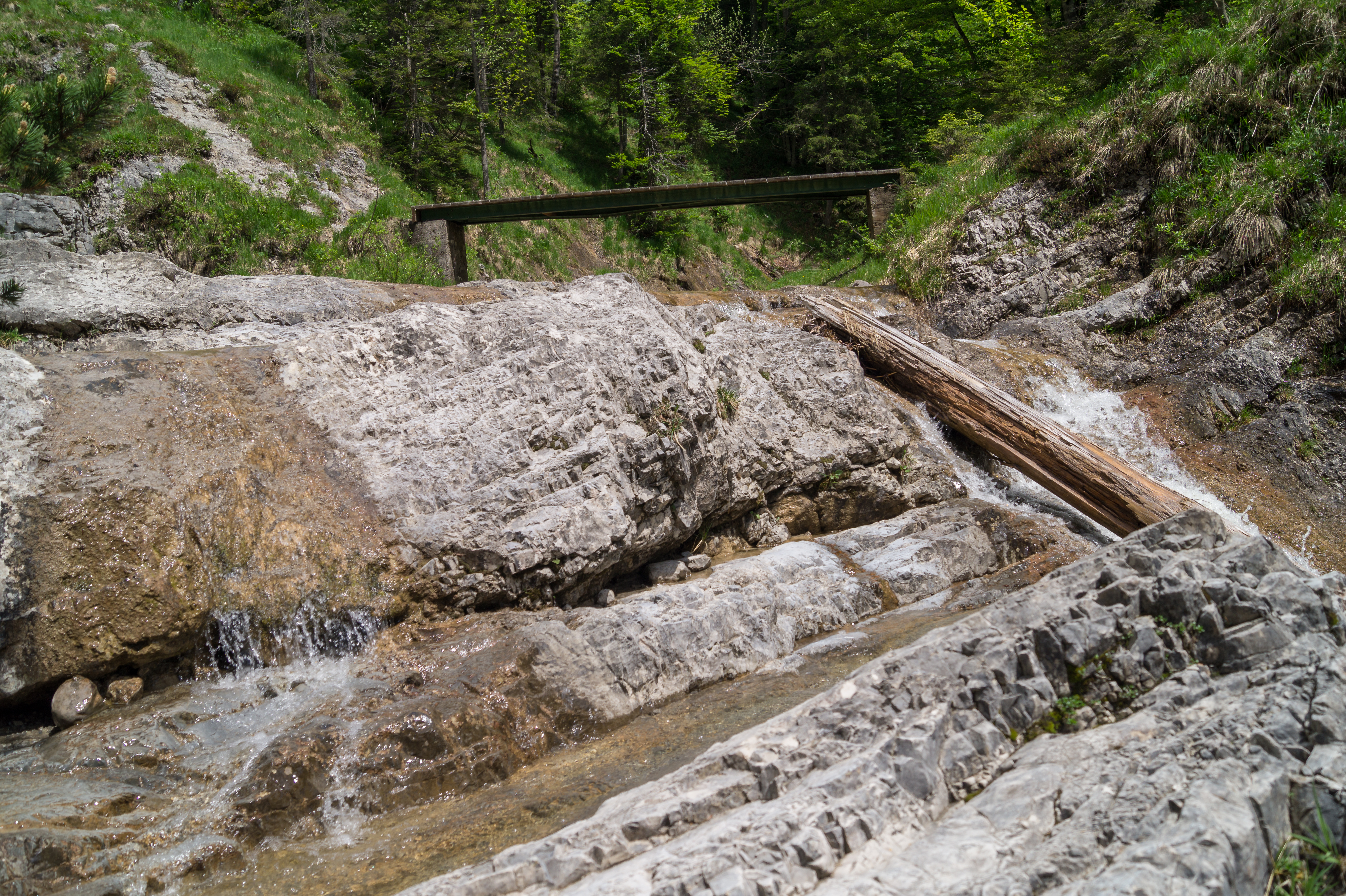 Am Staffelbach auf Höhe der Einmündung des Walchgrabens.